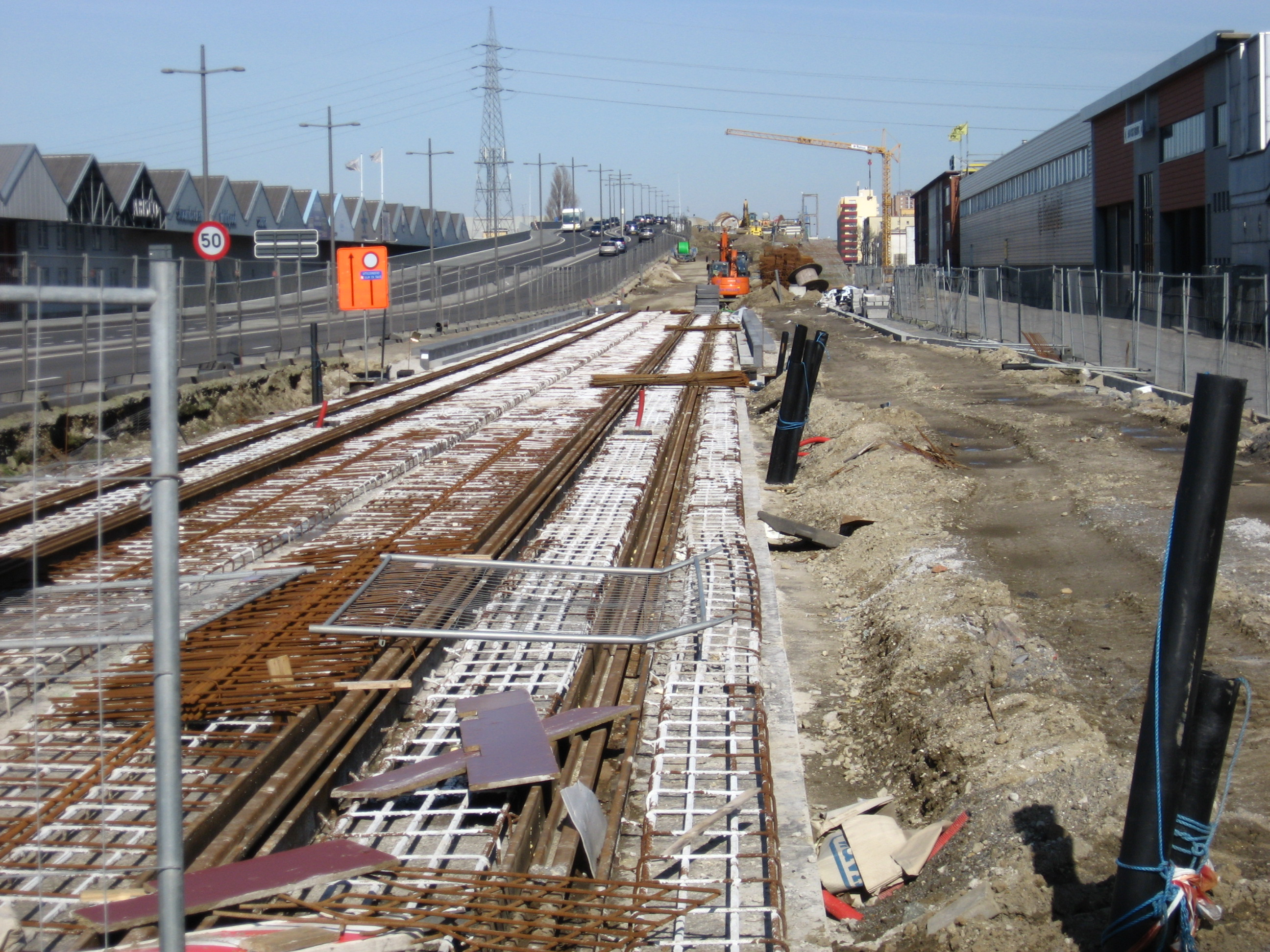 De nieuwe brug van de Noorderlaan voor de tram. rails worden gelegd.